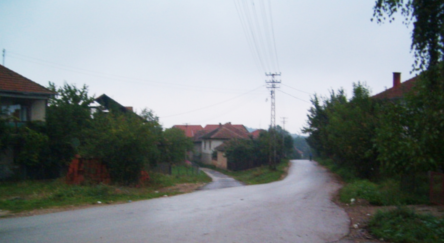 Сувојница.